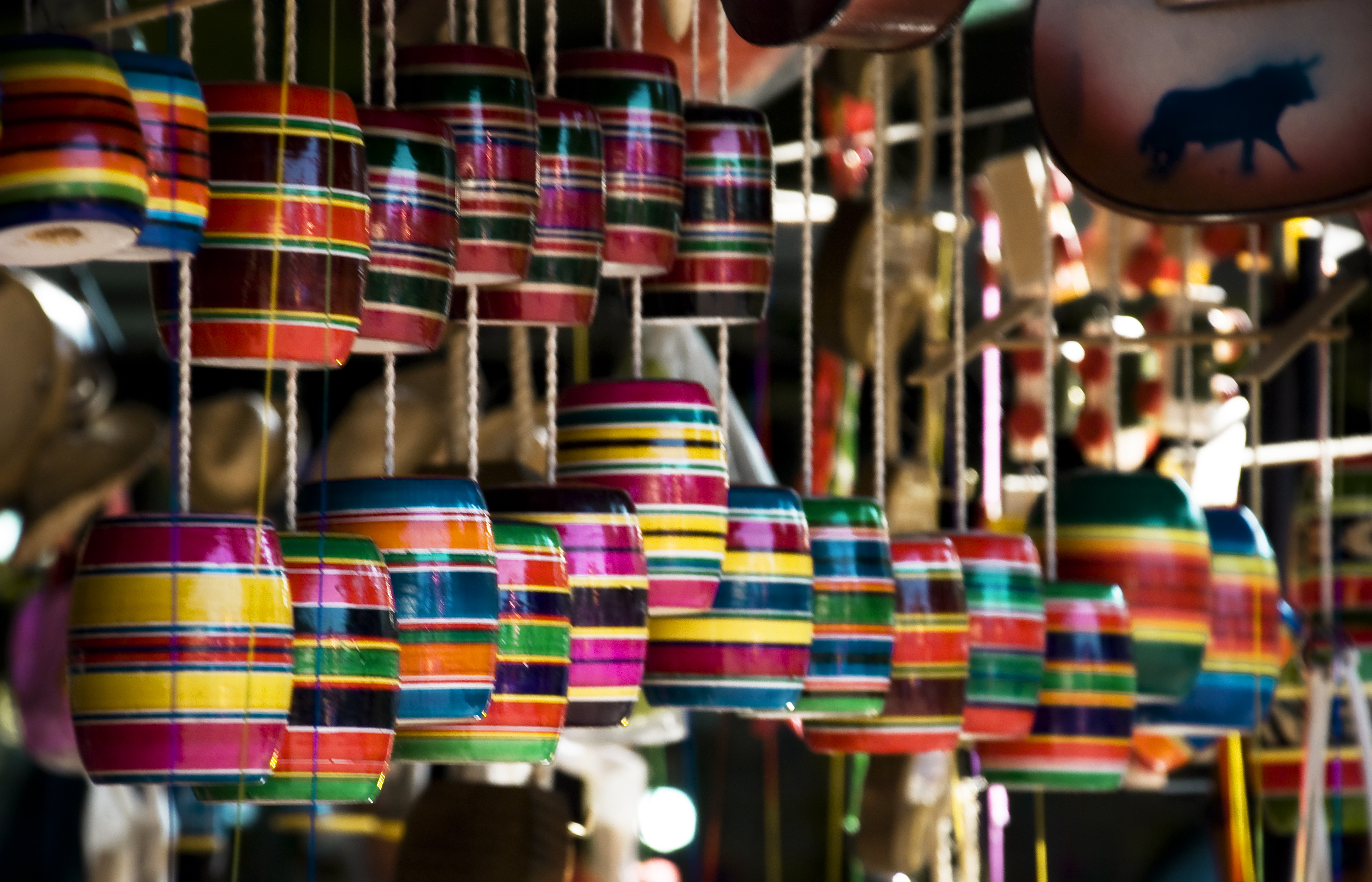 ¡Esto es méxico! Colooores, alegría, diversidad... pinturas "ligéramente tóxicas" en juguetes... ¡Sí! Y "Mi ciudad es chinampa en un lago escondidooooo, es zenzontle que busca en donde hacer nidoooooo" ¡Cantemos! ¡Cantemos todos! Yeiii